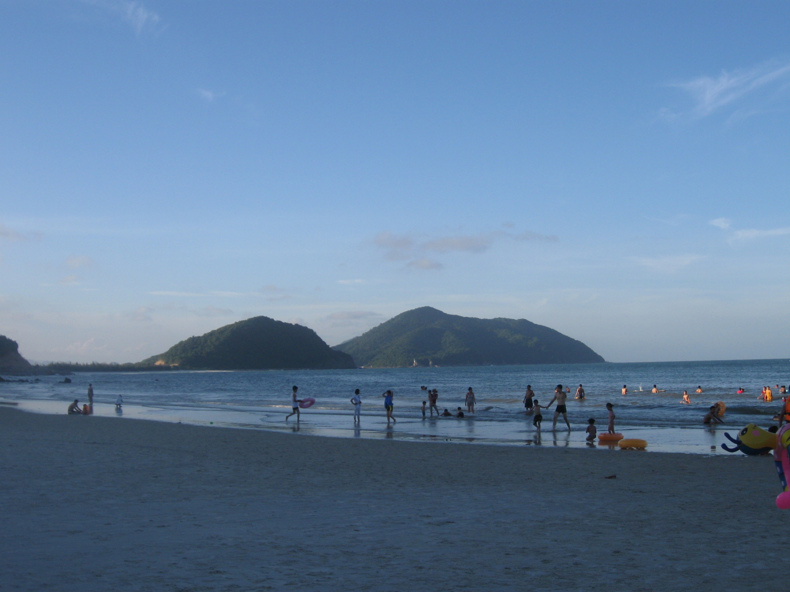 Một góc bãi biển Minh Châu, Vân Đồn, Quảng Ninh